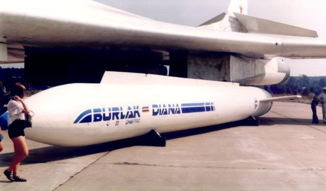 Burlak, a Russian air-launched winged orbital launch vehicle.